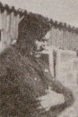 اوقااتي Licensing الصورة منسوخة من كتاب مذكرات صبحي عبد الحميد.